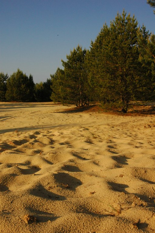 So-called "Záhorská púšť"